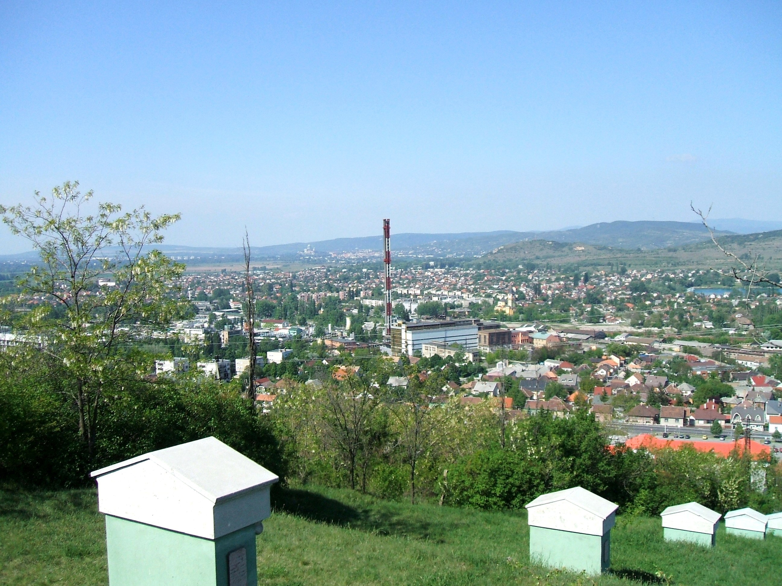 Dorog